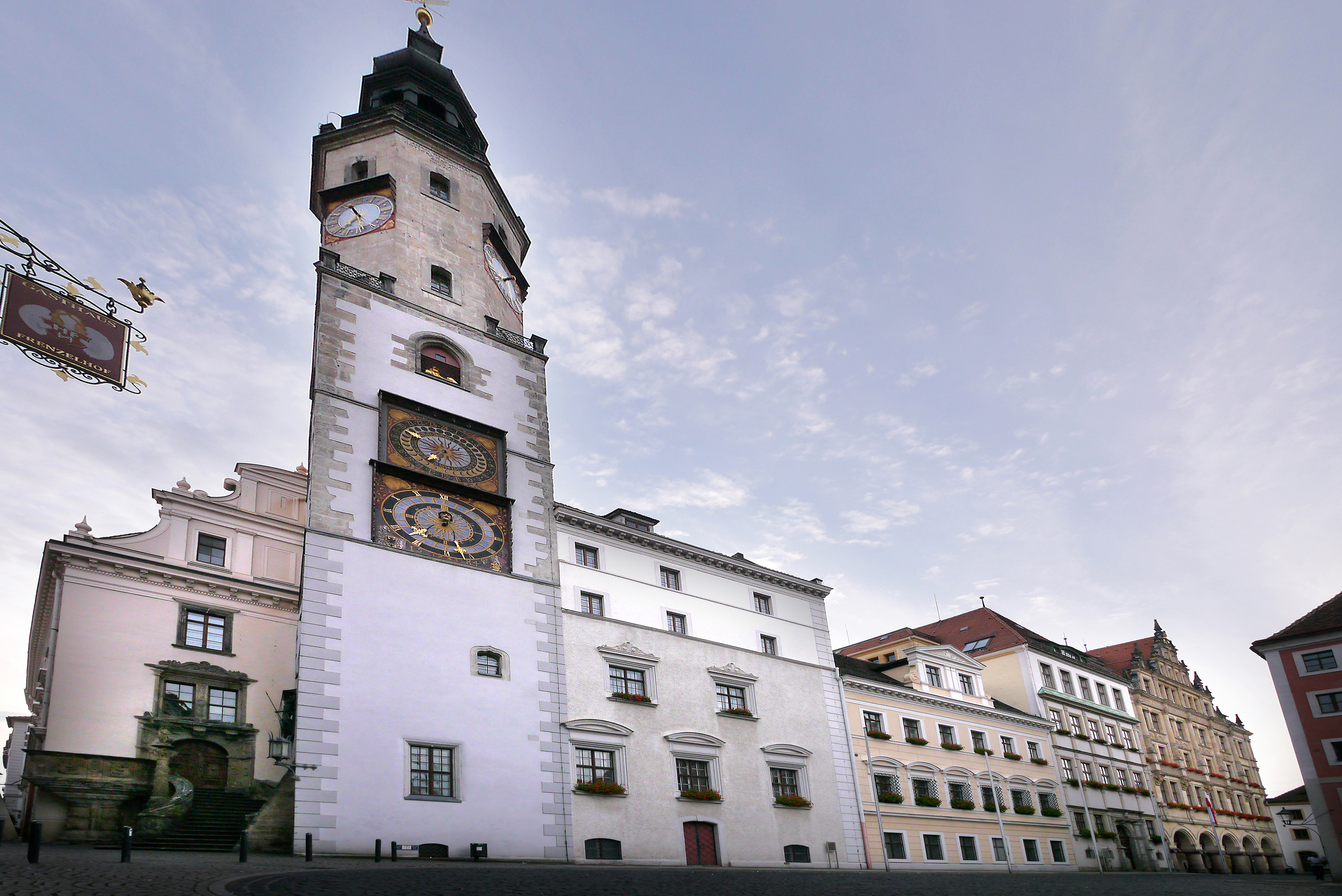 Rathaus in Görlitz - Vorderansicht